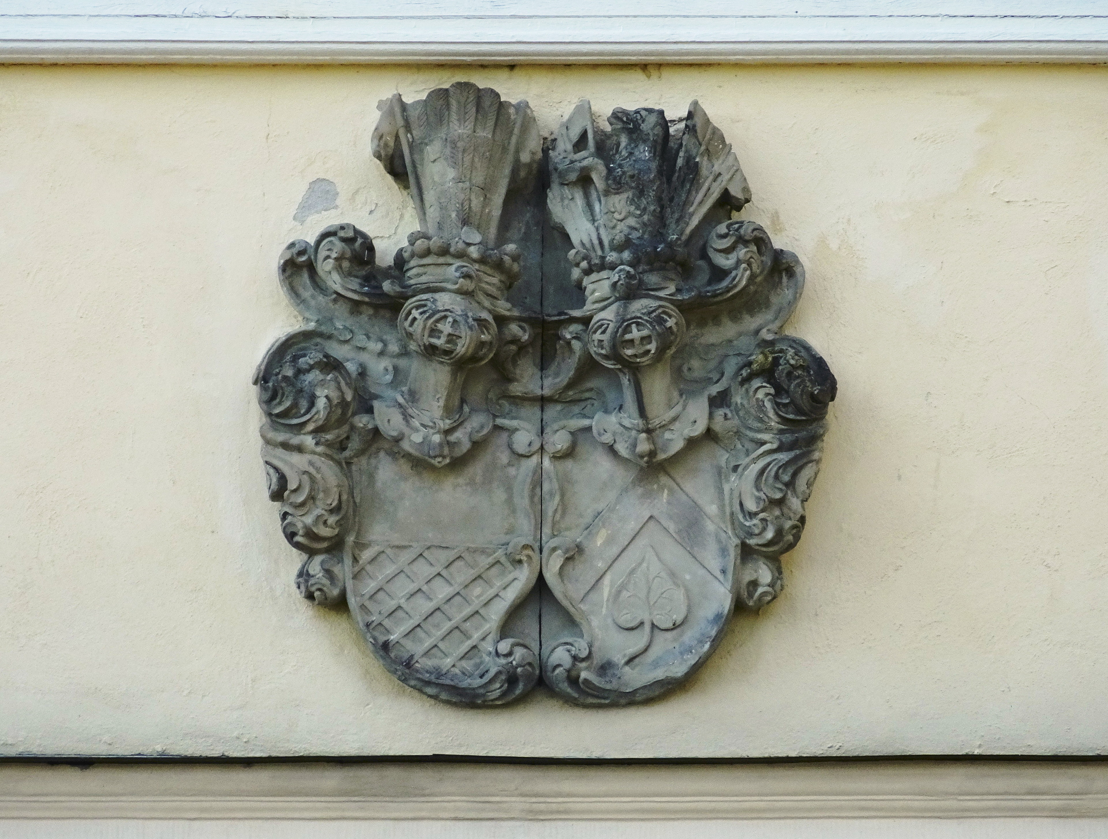 Haga slott, Enköping, huvudbyggnad, gårdsfasad, vapen för Gustaf Persson Natt och Dag och Christina Ulfsparre af Broxvik.